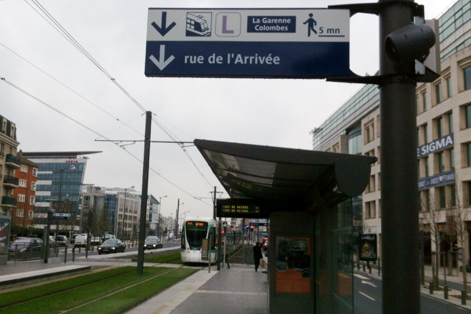 Panneau de correspondance entre le tramway T2 à Charlebourg et le Transilien L à La Garenne-Colombes